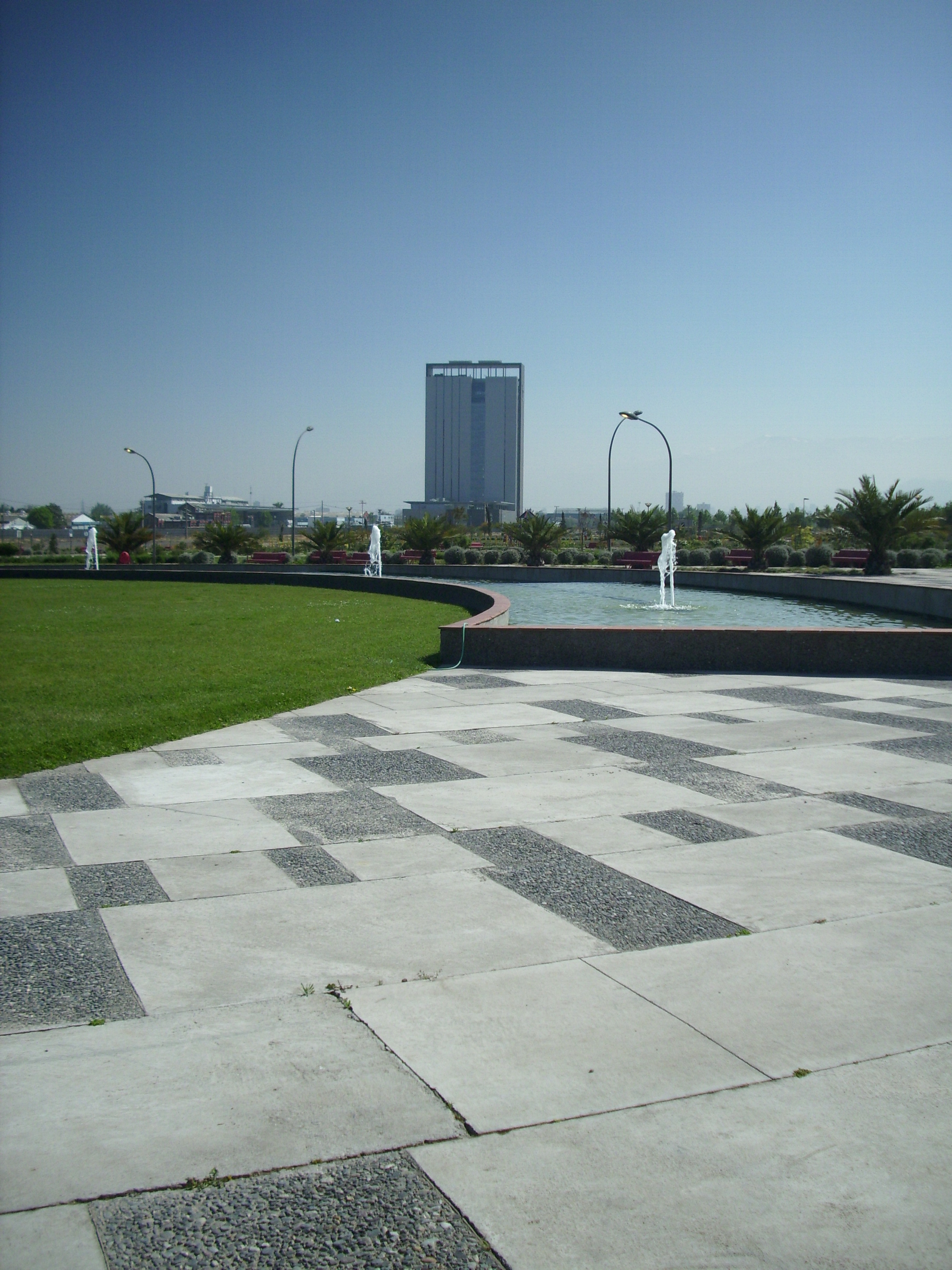 El edificio Delphos de la Fuerza Aérea de Chile visto desde el Parque Portal Bicentenario, en la comuna de Cerrillos, Santiago de Chile.